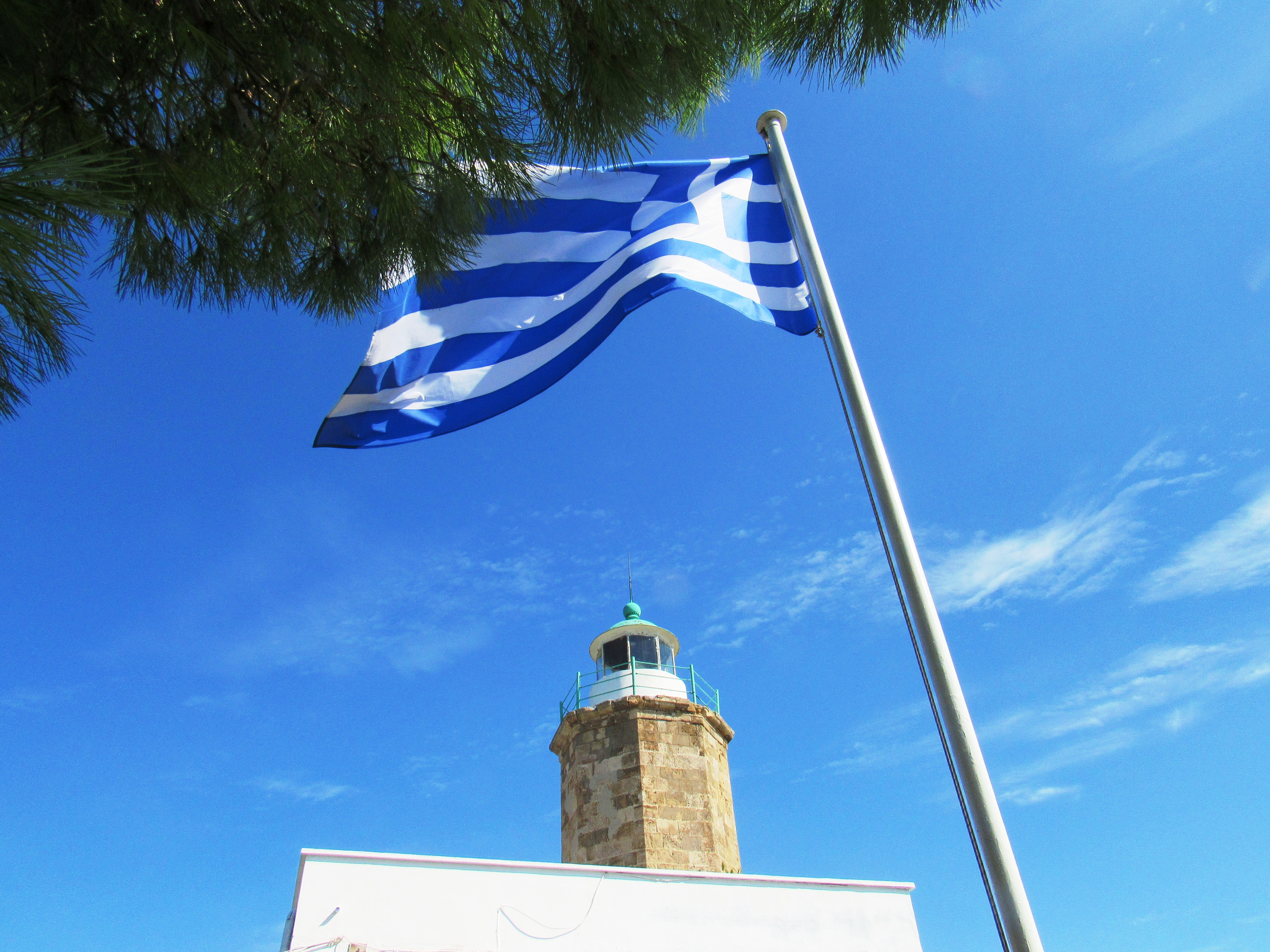 «Φάρος στο Κατάκολο Ηλείας»